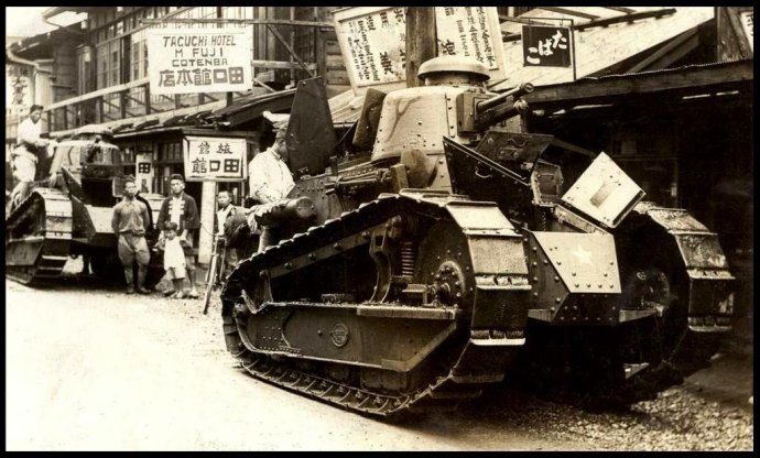 開到福岡縣春日市街上的兩輛日軍FT坦克。 Kasuga, Fukuoka open to the street two Japanese FT tanks